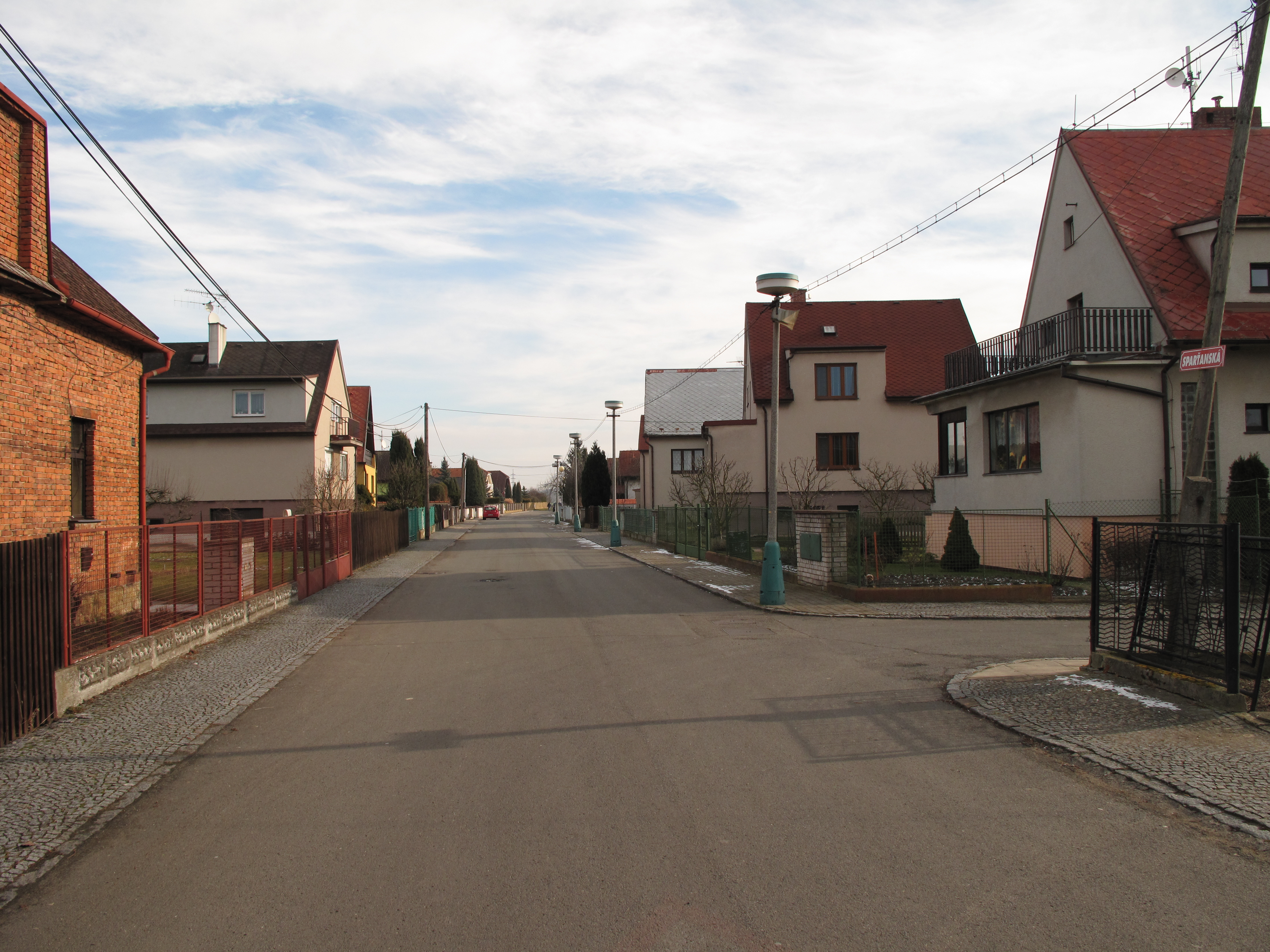 Ulice v Řepově. Okres Mladá Boleslav, Česká republika.